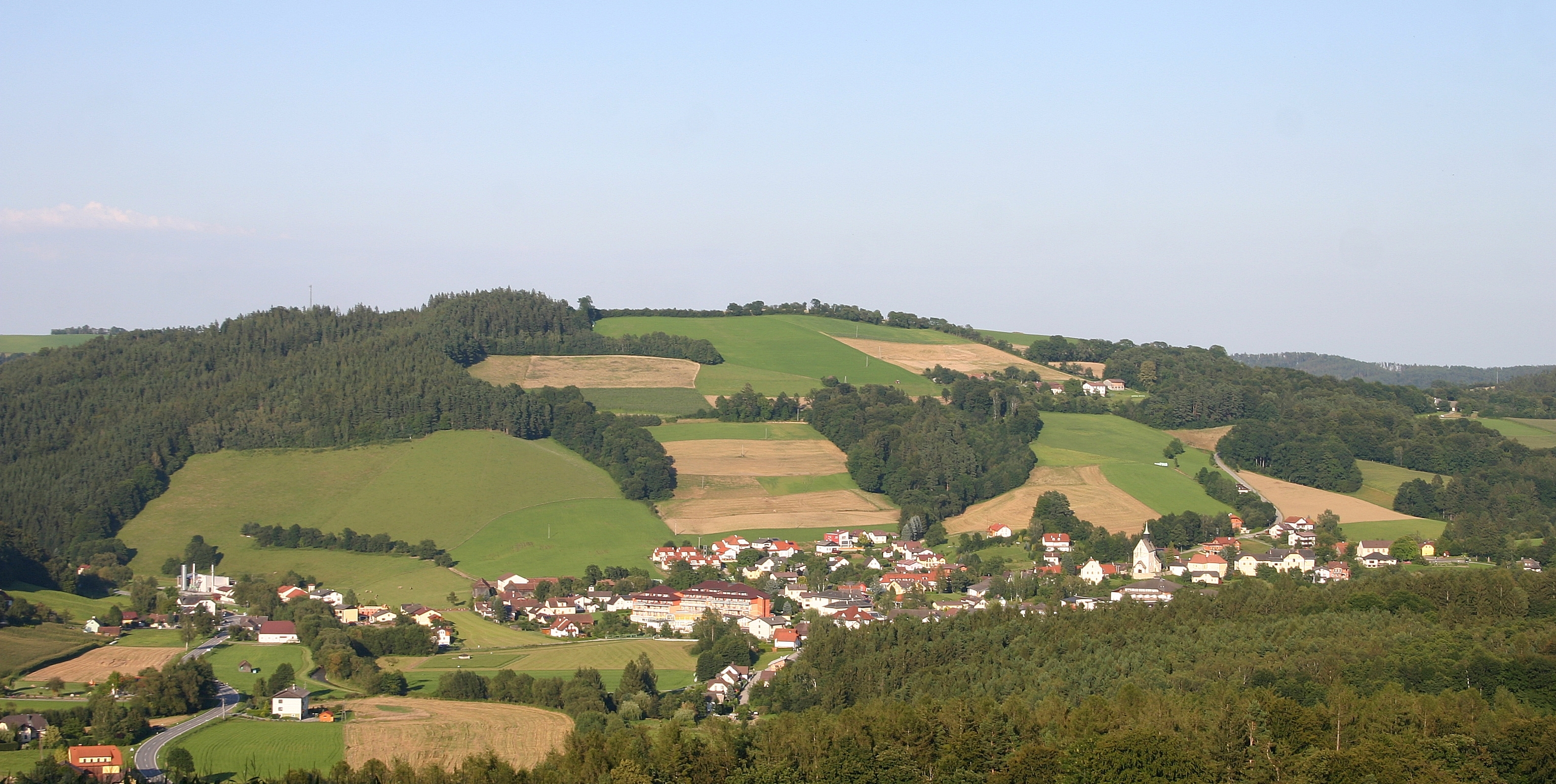 Bad Schönau Gesamtansicht von Westen